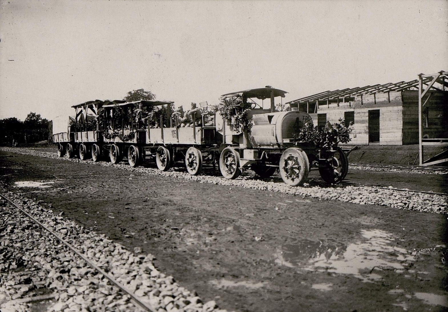 Erste Fahrt der Feldbahn bei Comen